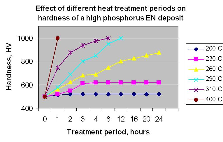 schéma electroless nickel